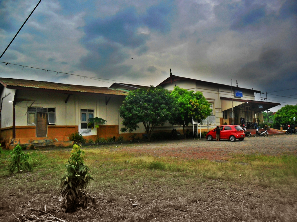 Bagian luar Stasiun Serang